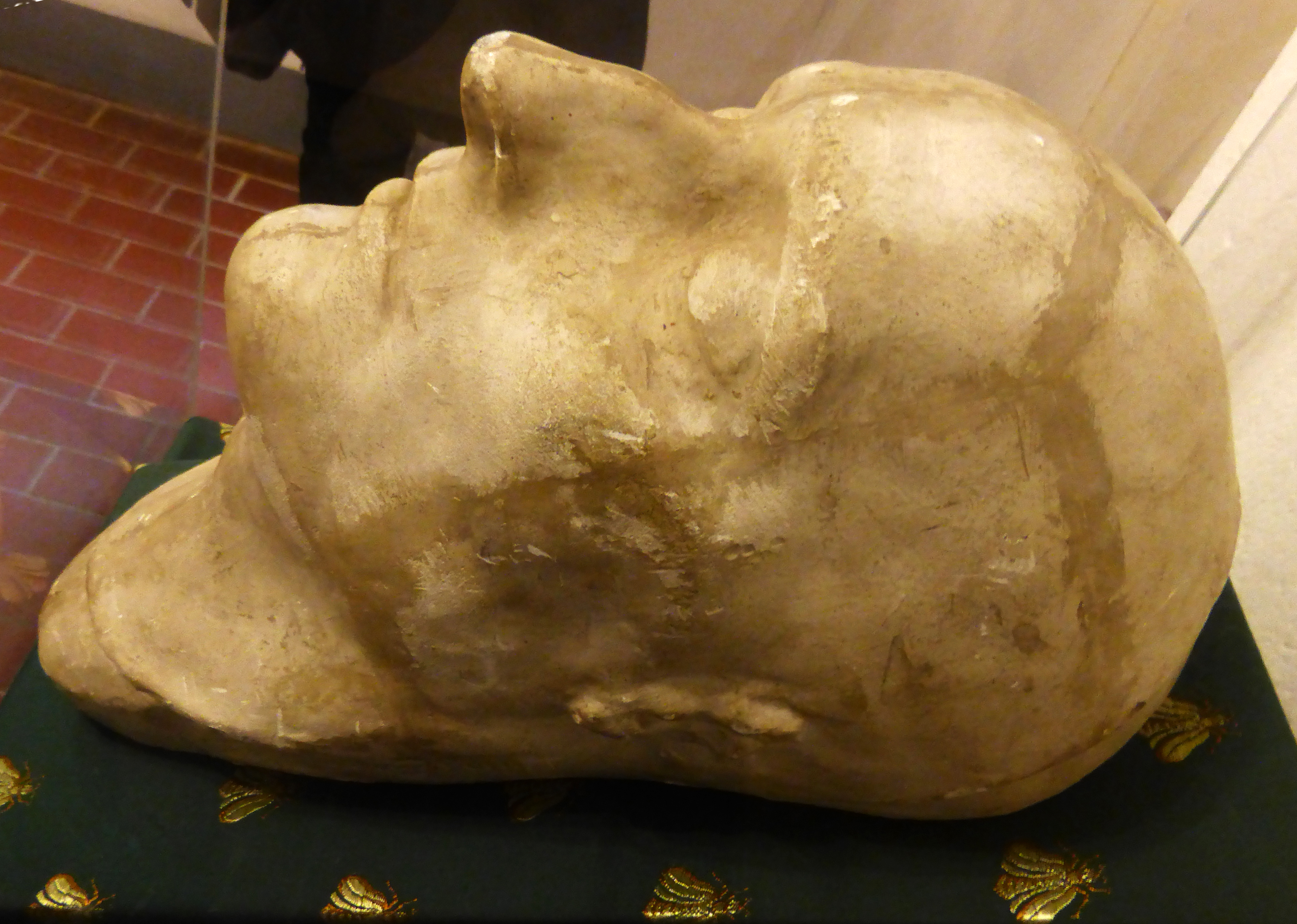 Totenmaske von Napoleon Bonaparte aus Gips. Gefertigt vom Leibarzt Francesco Antommarchi am 7. Mai 1821. Aus dem Besitz der Gräfin Auguste Charlotte von Kielmannsegge. Ausgestellt im Militärhistorischen Museum Wolkenstein, Schloßplatz 4, Wolkenstein.